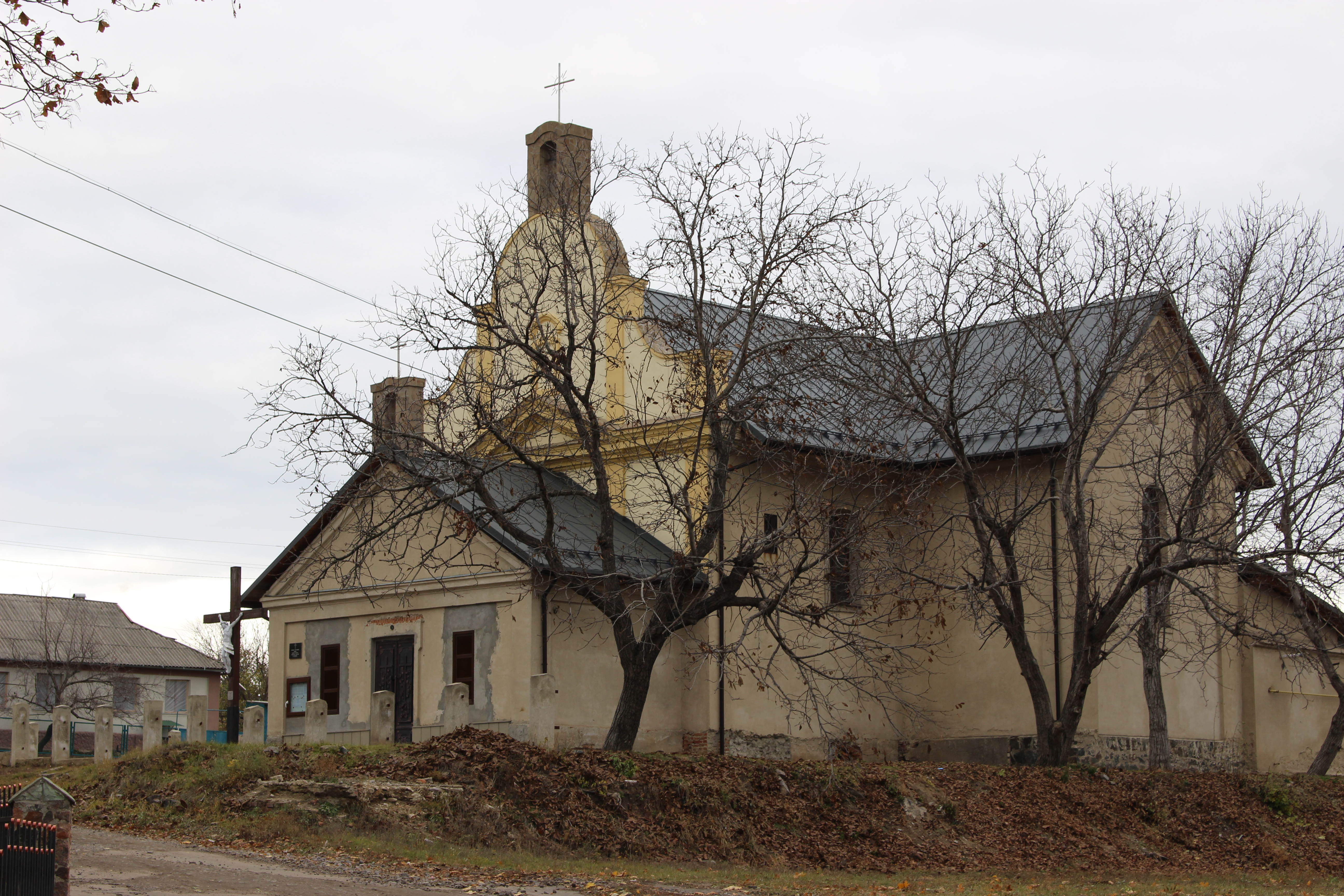 Костьол св. Станіслава, Балта, вул. Уварова, 2